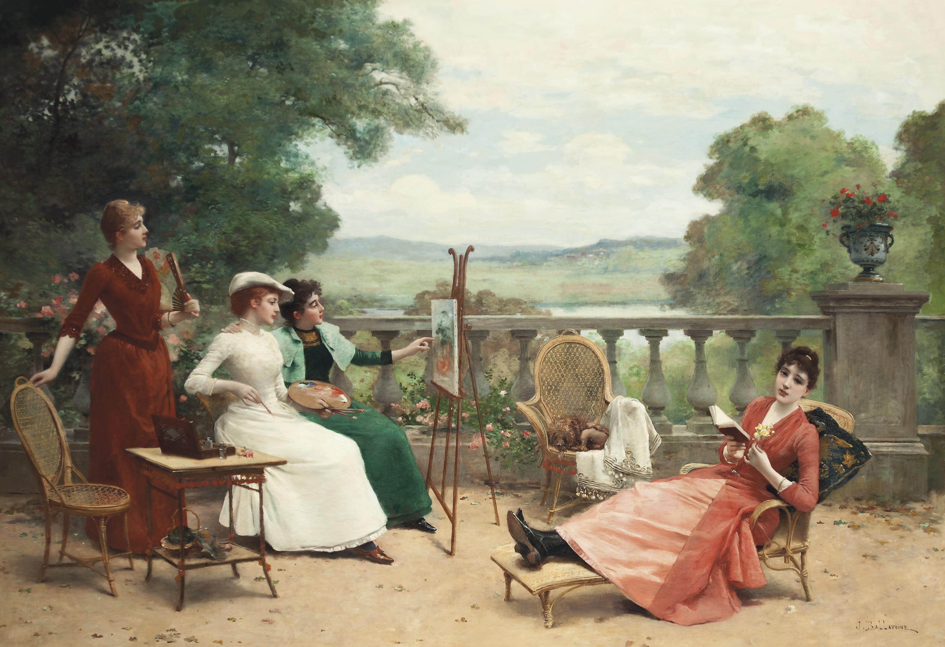 La leçon d'art